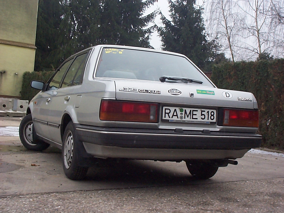 Mazda 323 BF Vorfacelift Heckansicht